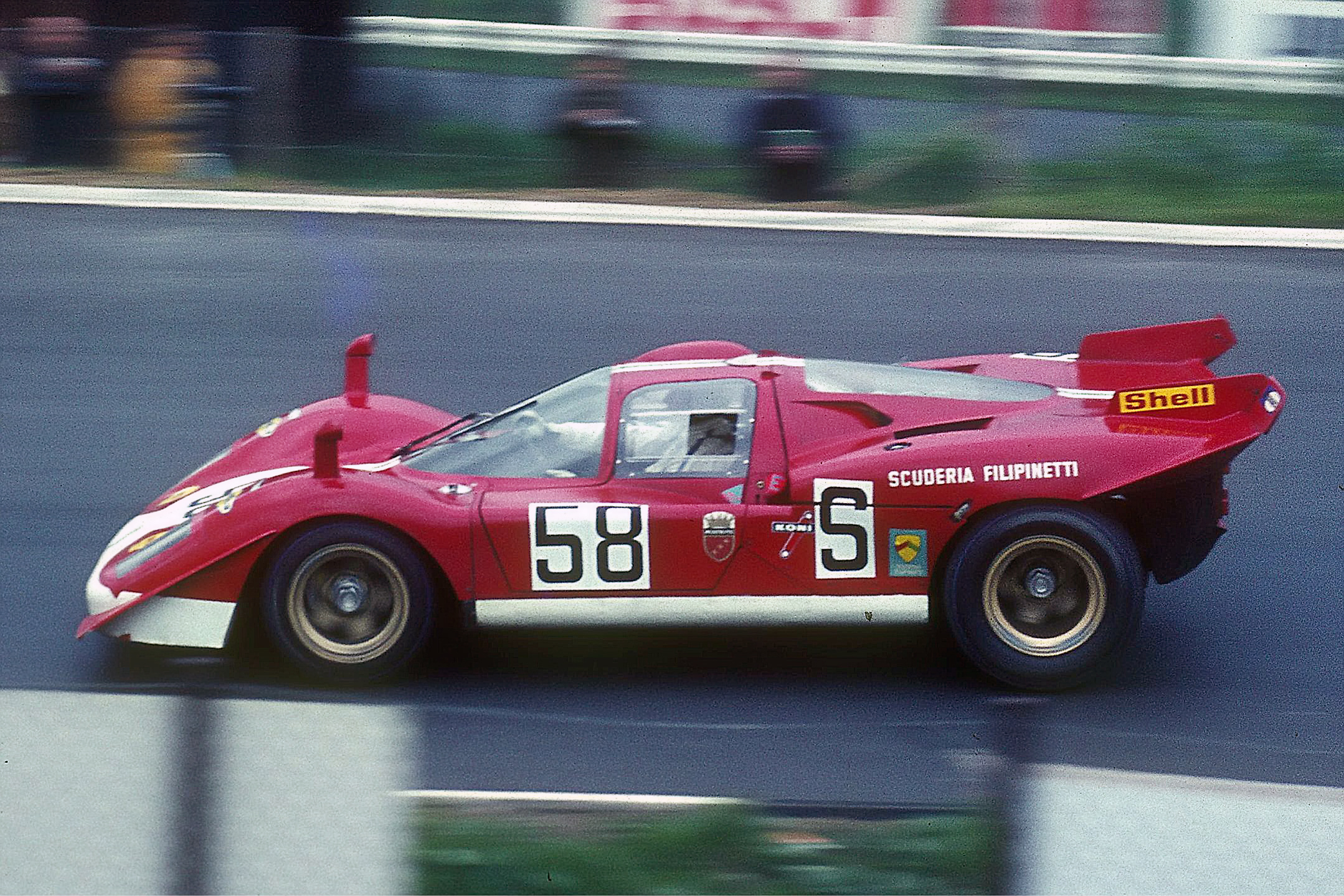 Mike Parkes im 1970 Ferrari 512 S s/n 1008 auf dem Nürburgring, eingangs Südkehre.[1]